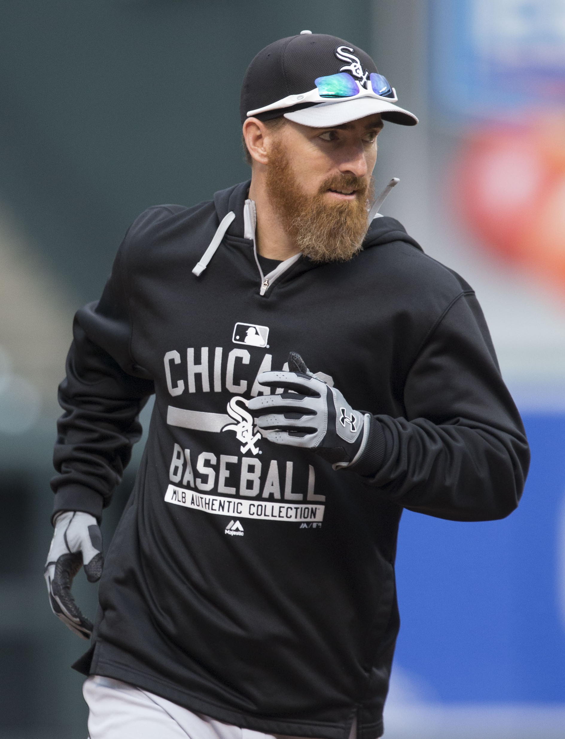 Adam LaRoche